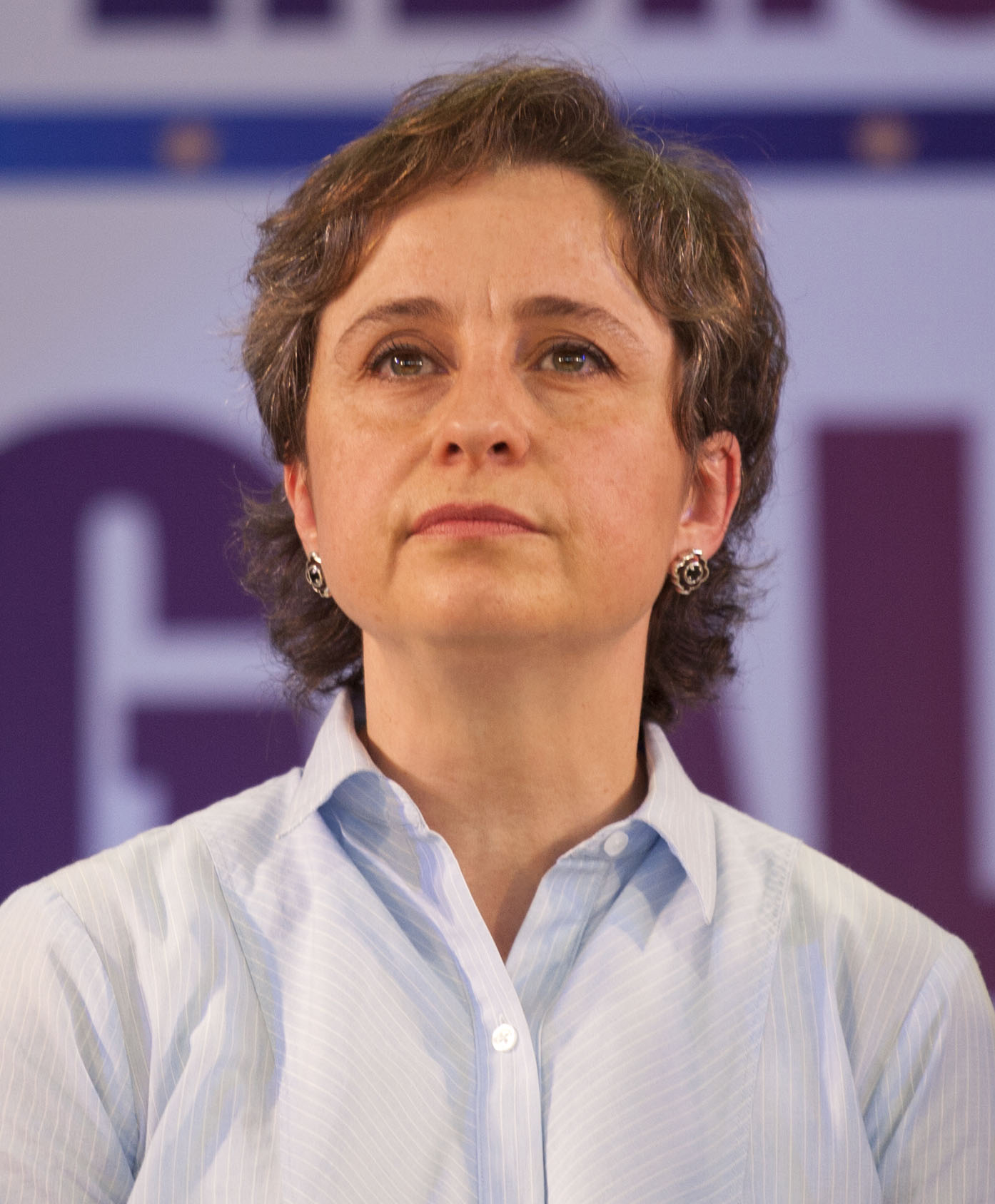 Domingo, 11 de octubre 2015. Mesa de informacion con la comunicadora Carmen Aristegui, Lorenzo Meyer y Denisse Dresser en el Foro Eduardo Galeano de la XV FILZ. Foto: Antonio Nava / Secretaría de Cultura